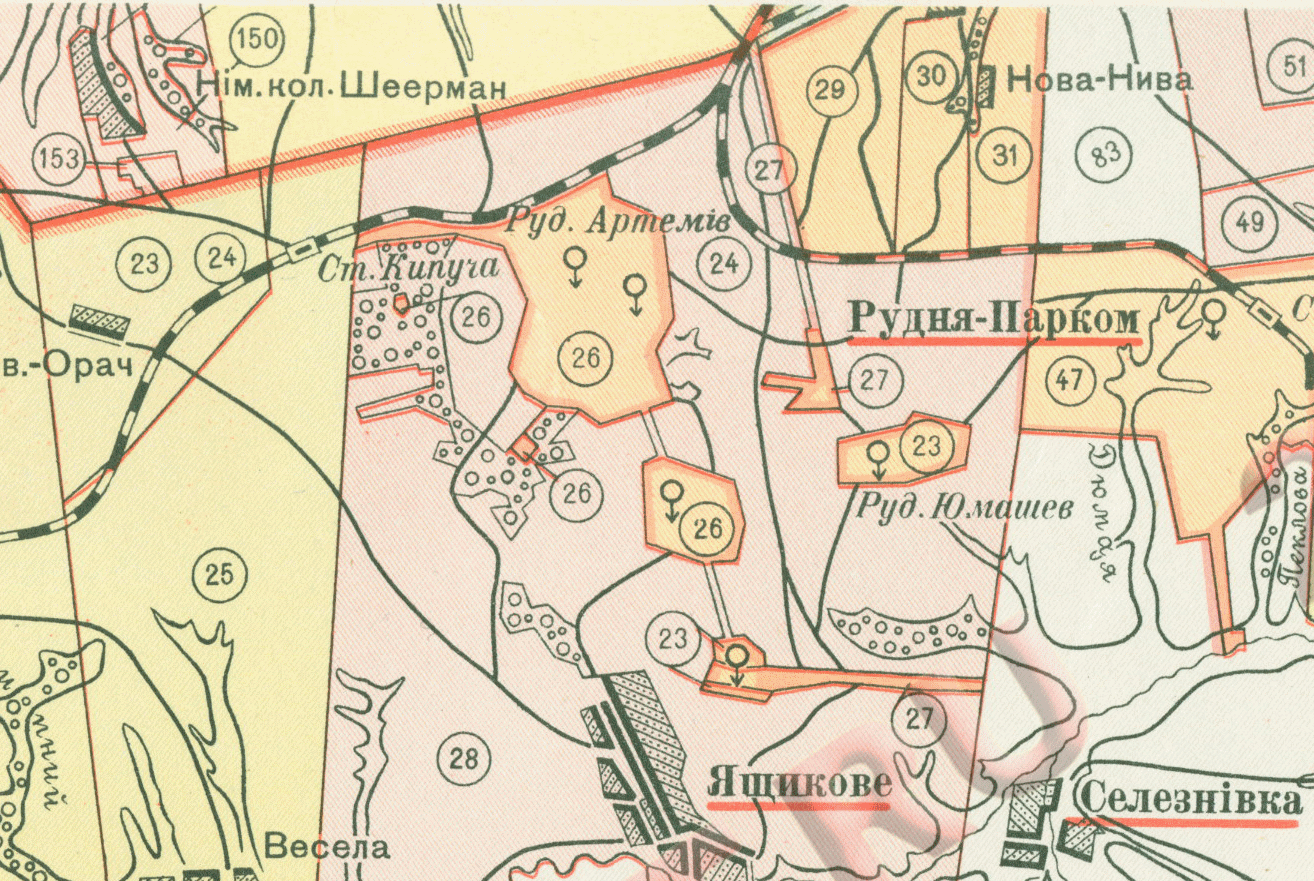 Німецька колонія Шерман та інші населені пункти.